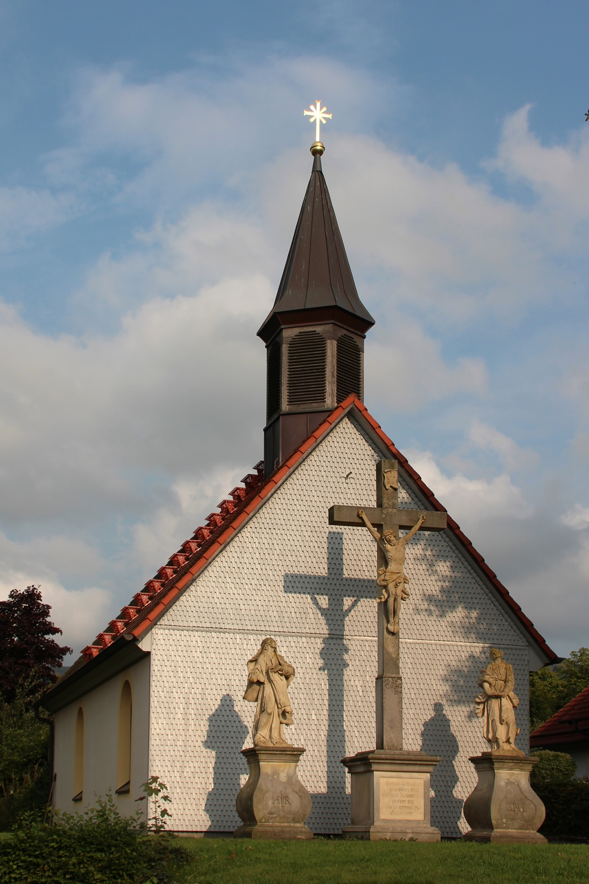 Kapelle St. Josef in Poppenhausen-Tränkhof (Hessen)